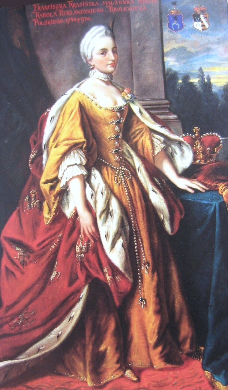 Franciszka Krasińska